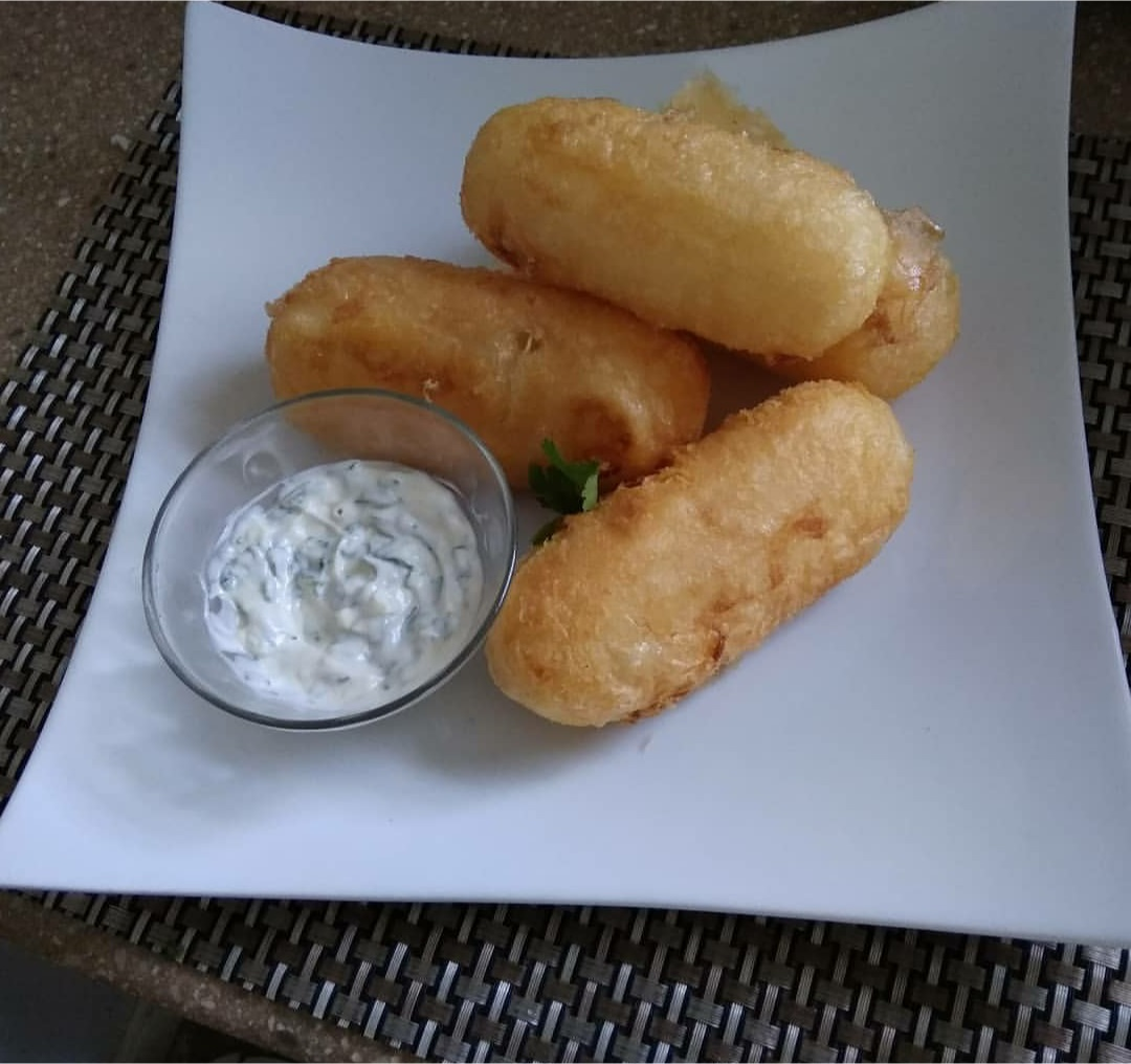 El enyucado es un platillo típico de Costa Rica que consiste en una especie de pastel de yuca relleno.